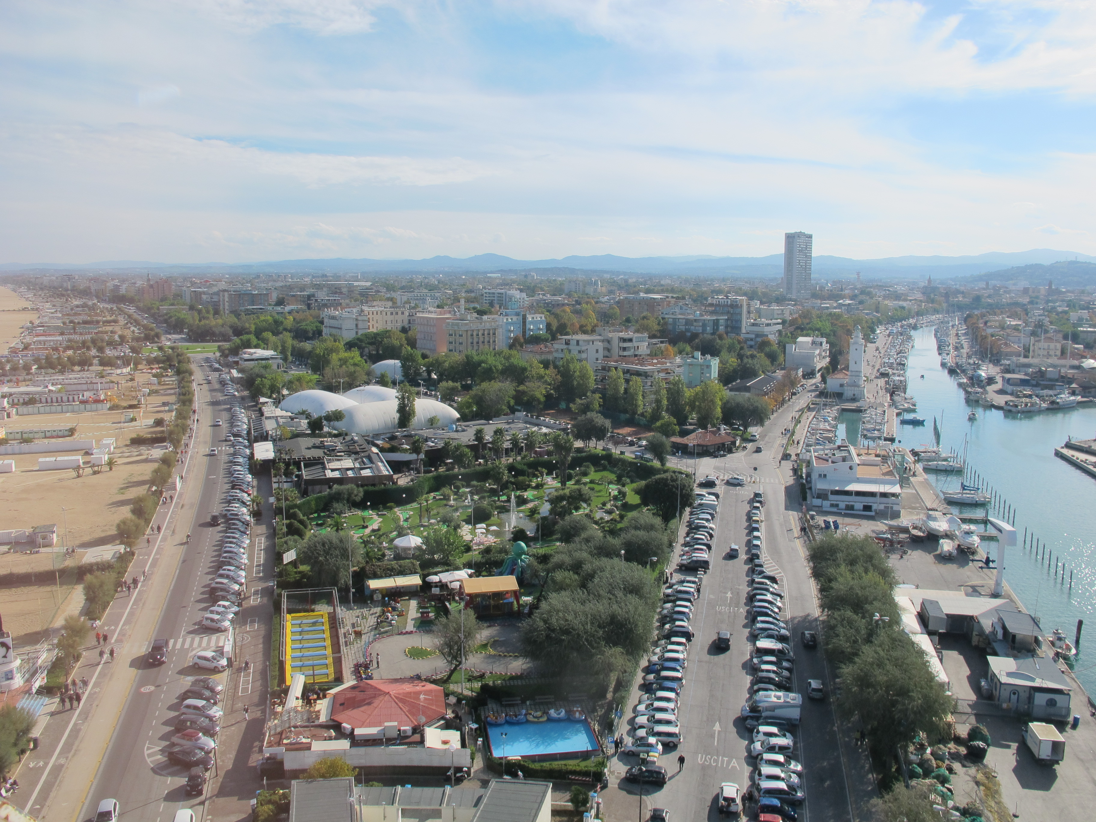 Rimini vista dalla ruota panoramica al porto.